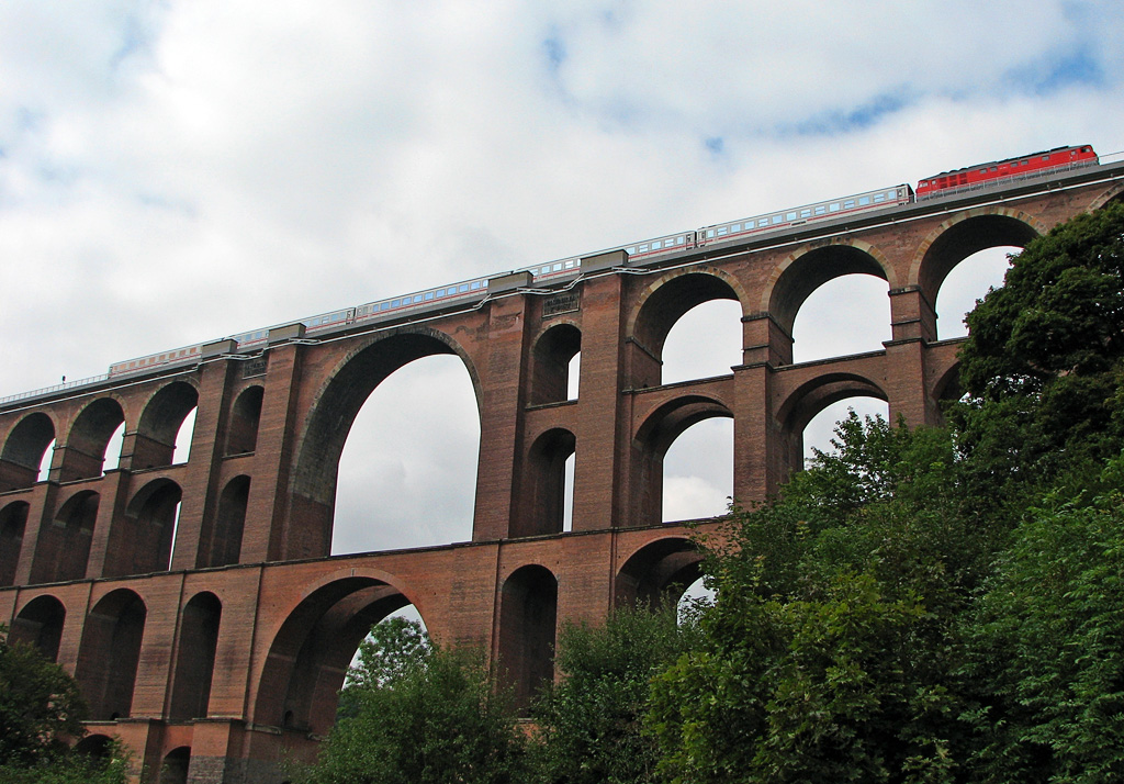 Göltzschtalbrücke